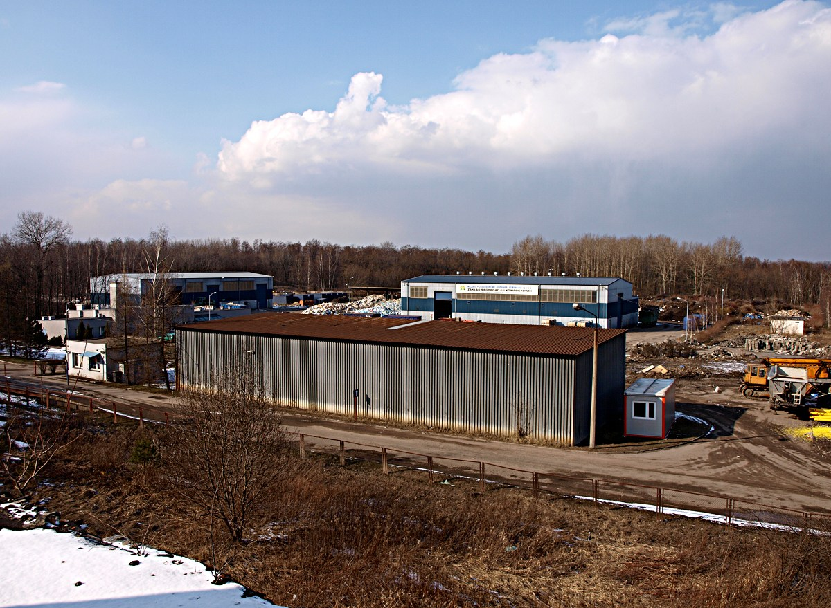 Ulica Cmentarna w Zabrzu. Wysypisko smieci.